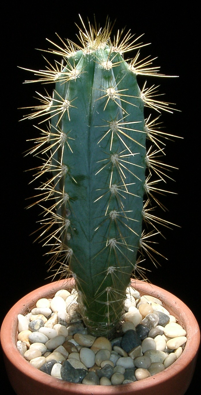 Pilosocereus azureus